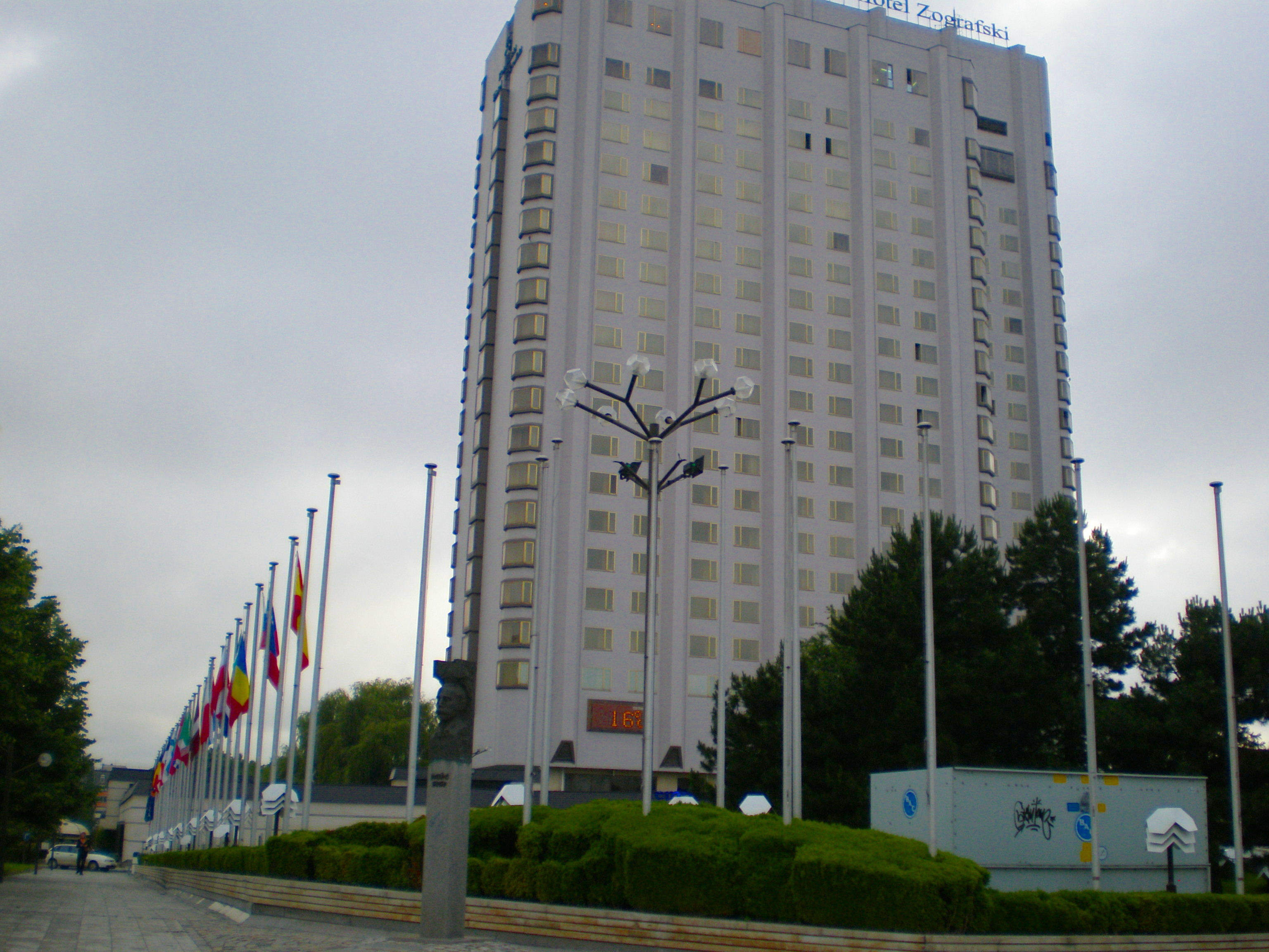 Zografski